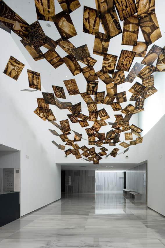 Entrada al Museo Arqueológico de Almería